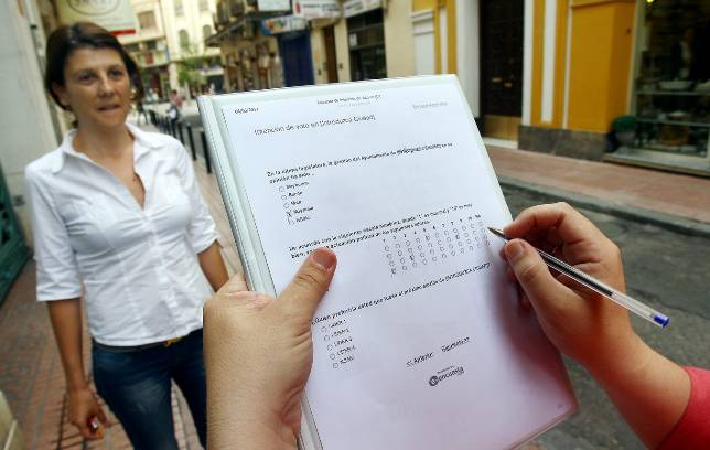 En aquestafoto podem veure un subjecte enquestant a una noia que passa pel carrer.